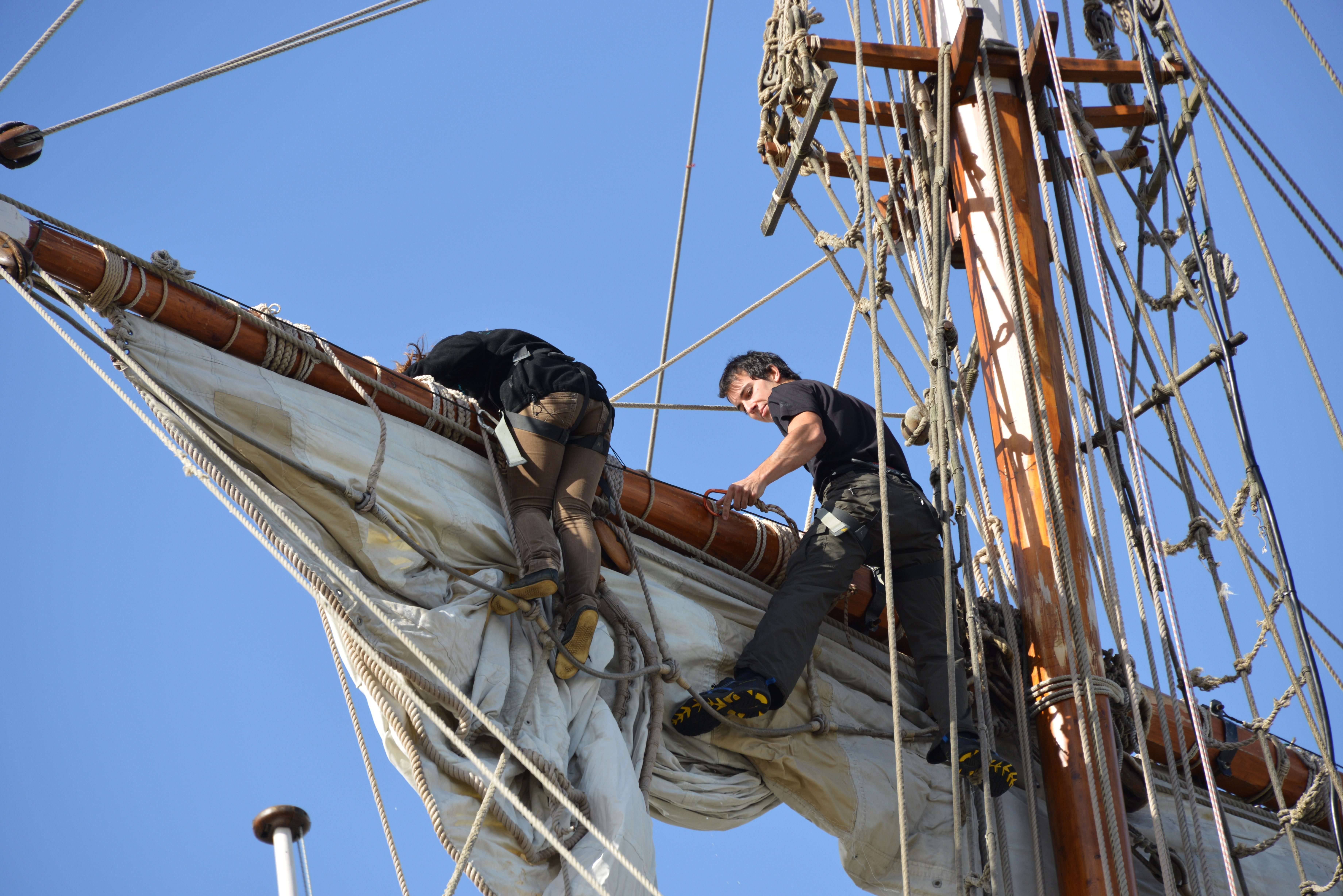 La mâture de la frégate russe Shtandart (Штандартъ) amarrée au Quai d’ Honneur dans le Bassin des Chalutiers lors de son escale à La Rochelle en octobre 2013. La Rochelle, Charente Maritime, France.